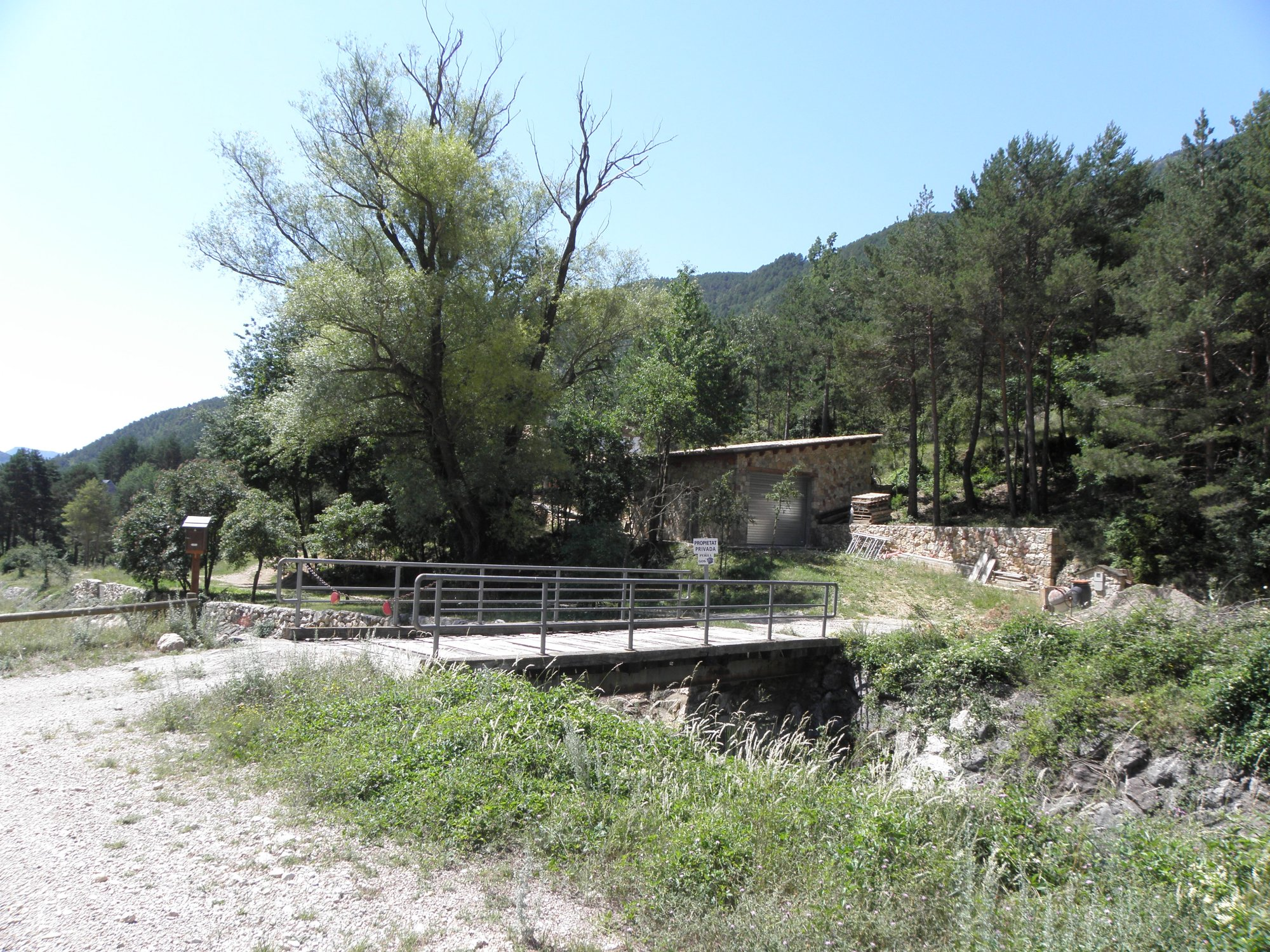 Accés a la masia de Cal Ramon Gansola, al poble de la Com (municipi de la Coma i la Pedra), a la Vall de Lord (Solsonès)